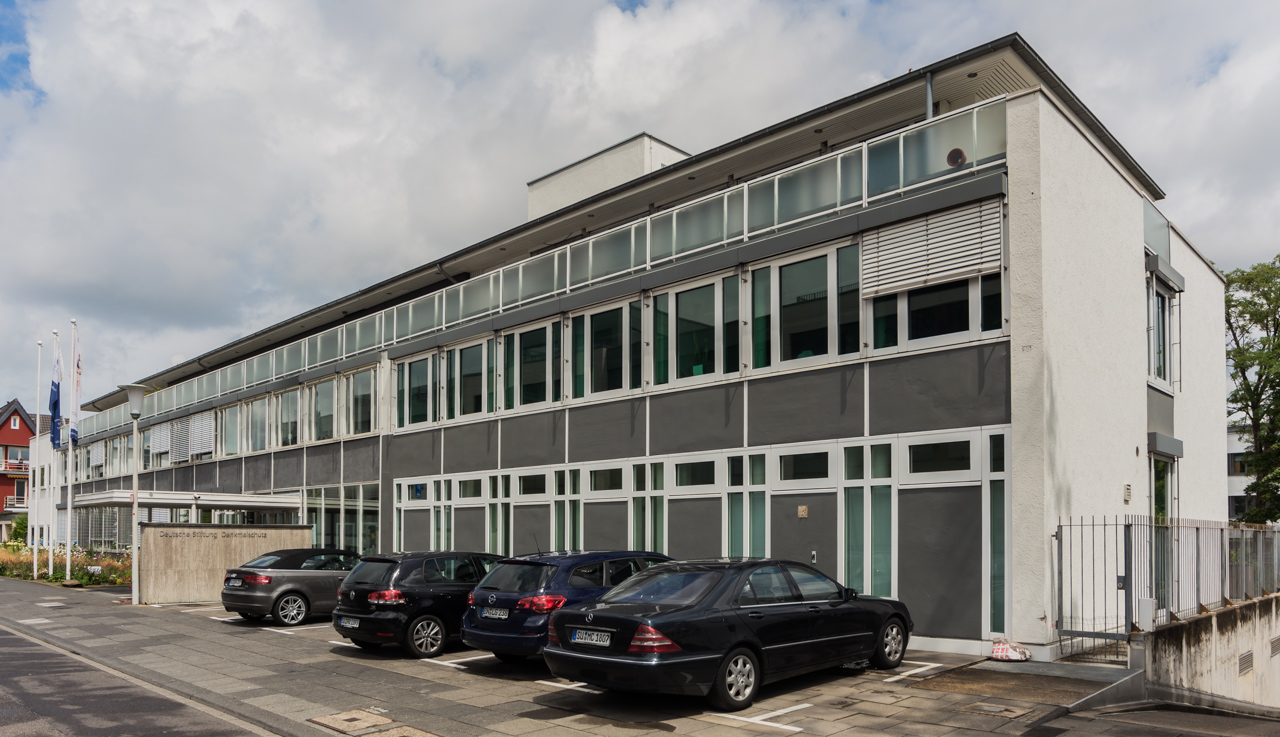 Schlegelstraße 1, Fassade nach Restaurierung der Landesvertretung des Freistaates Bayern (Bonn) in Bonn-Gronau